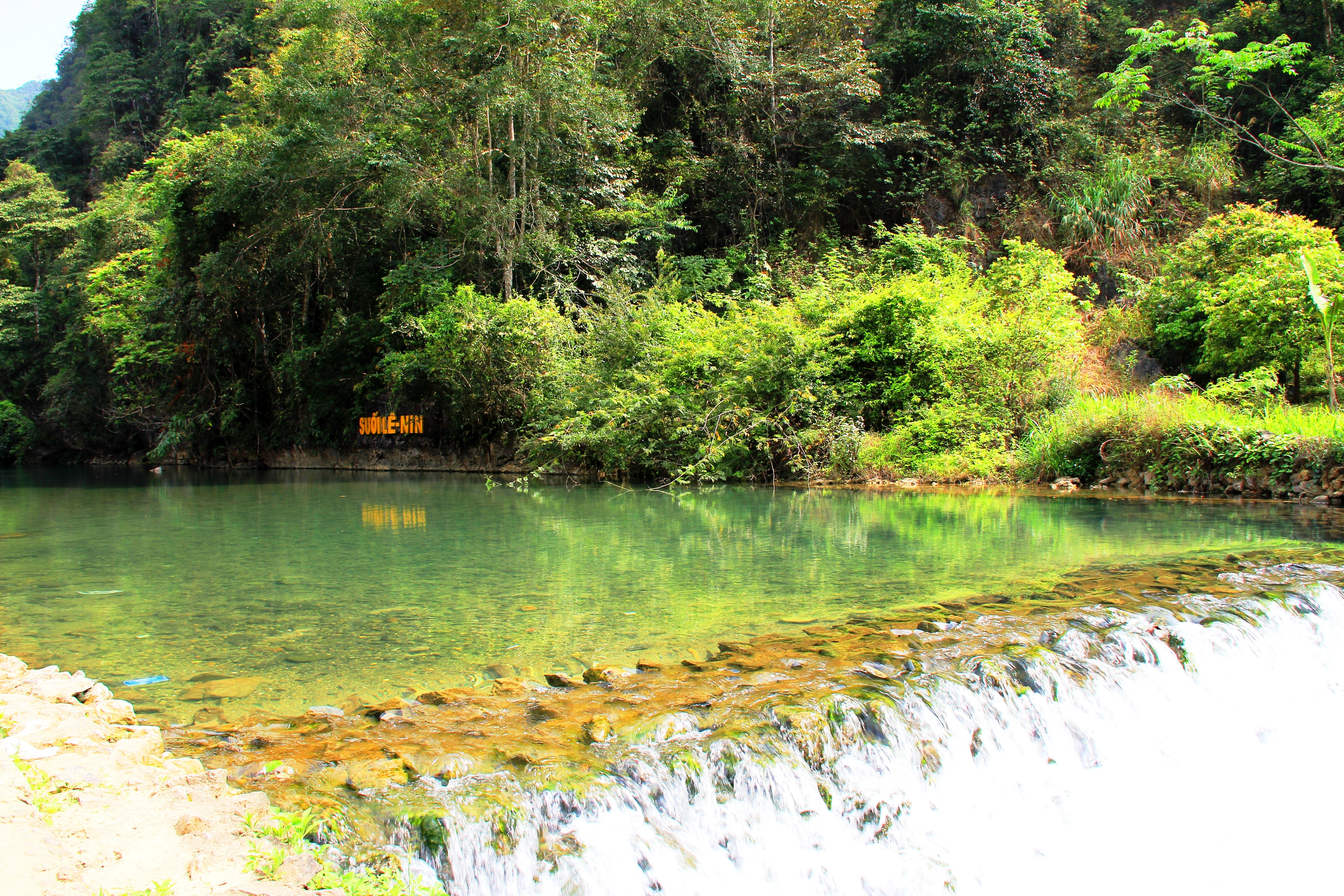 Suối Lê-nin, Đông Bắc 2012